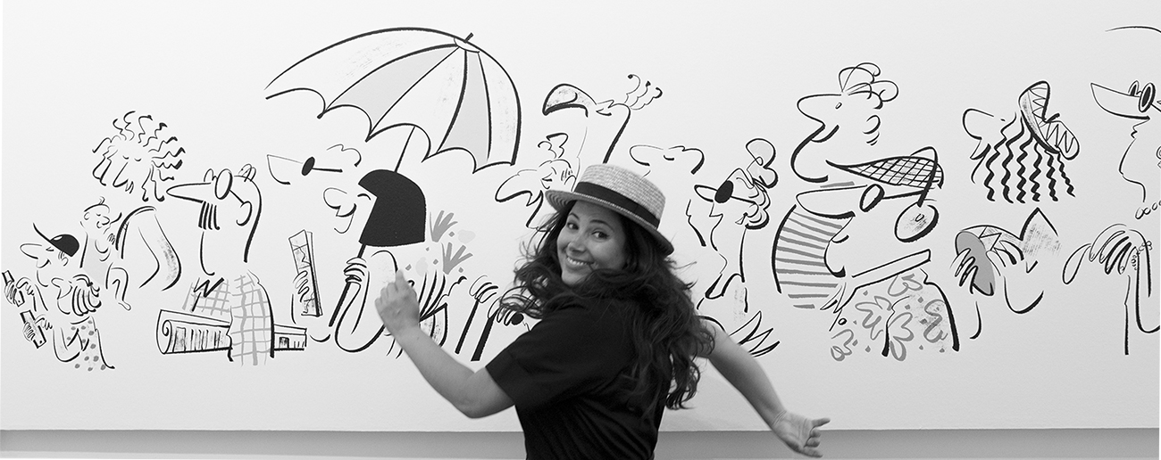 Imagen realizada en la librería Sala Ciutat de Barcelona. La ilustradora posa ante algunos de sus personajes.